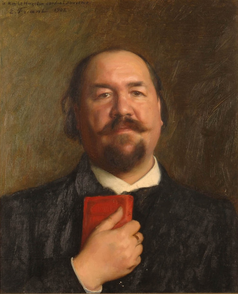 Portrait de l'écrivain Émile Hinzelin, peint par Émile Friant en 1908